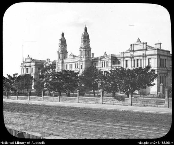 1912, Institution for the Deaf, Dumb and Blind, Sydney